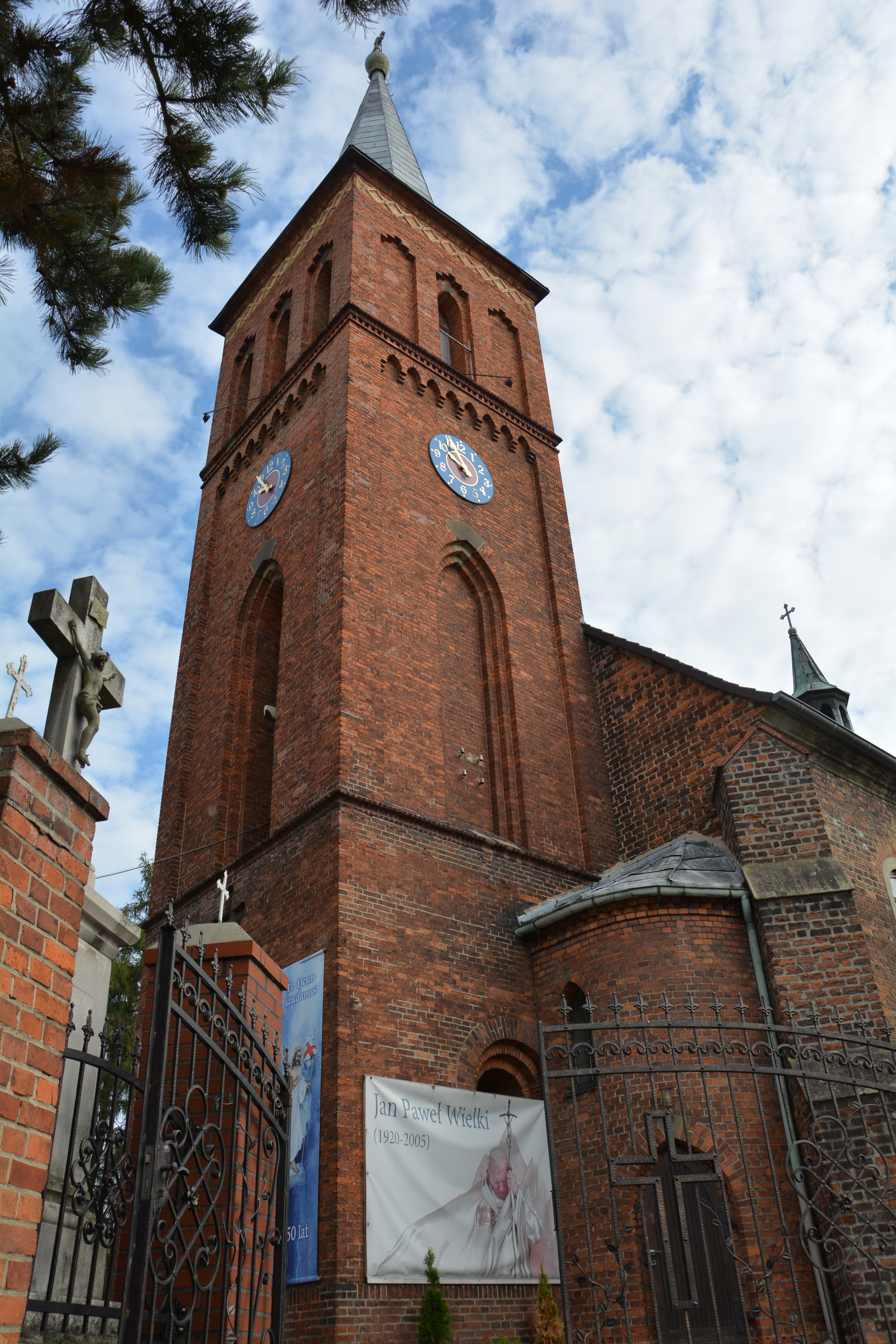 Jaryszów - rzymskokatolicki kościół parafialny p.w. Wniebowzięcia NMP, XV, 1860